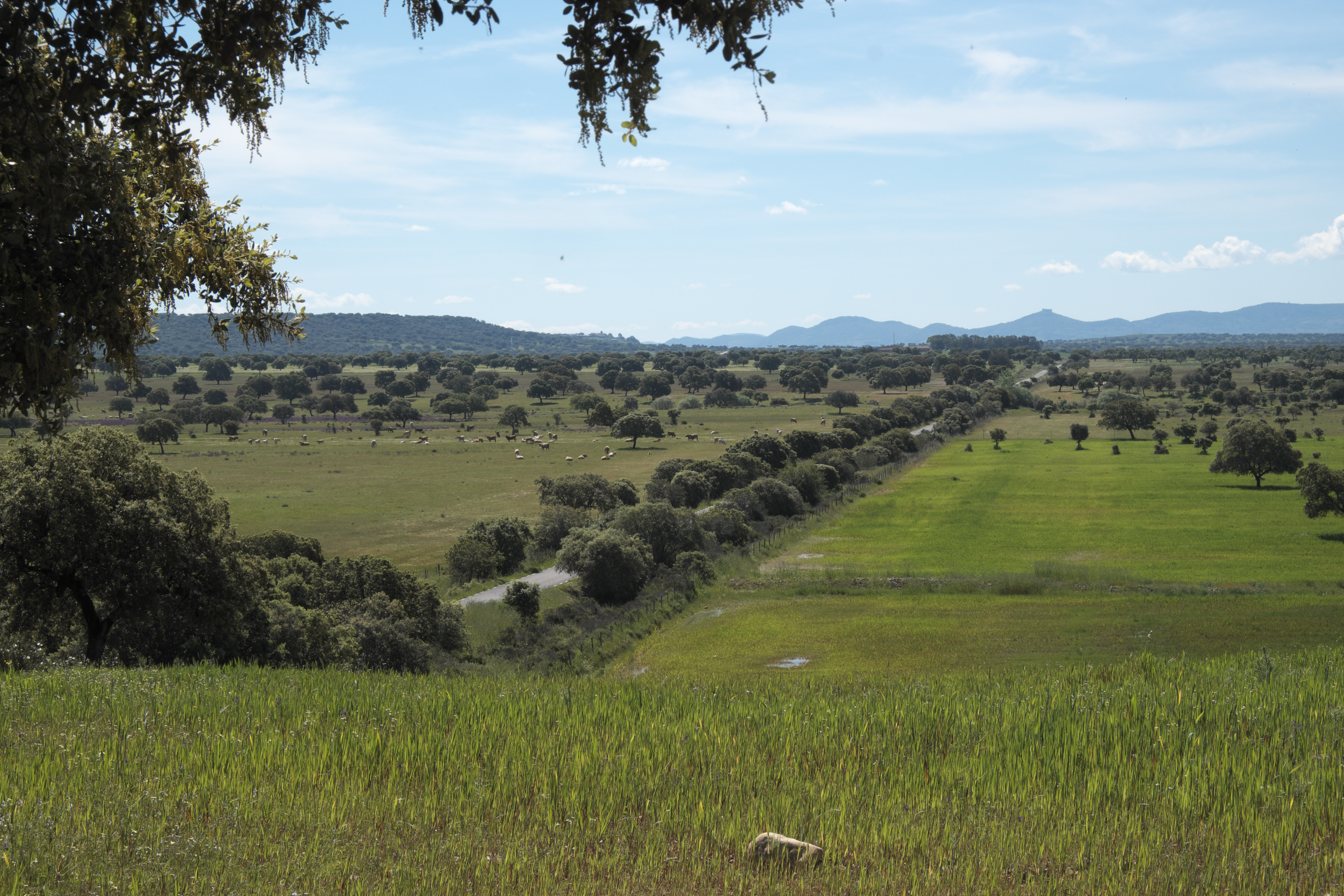 Landschaft bei Castilblanco in der Comarca La Siberia in der Provinz Badajoz (Extremadura/Spanien)